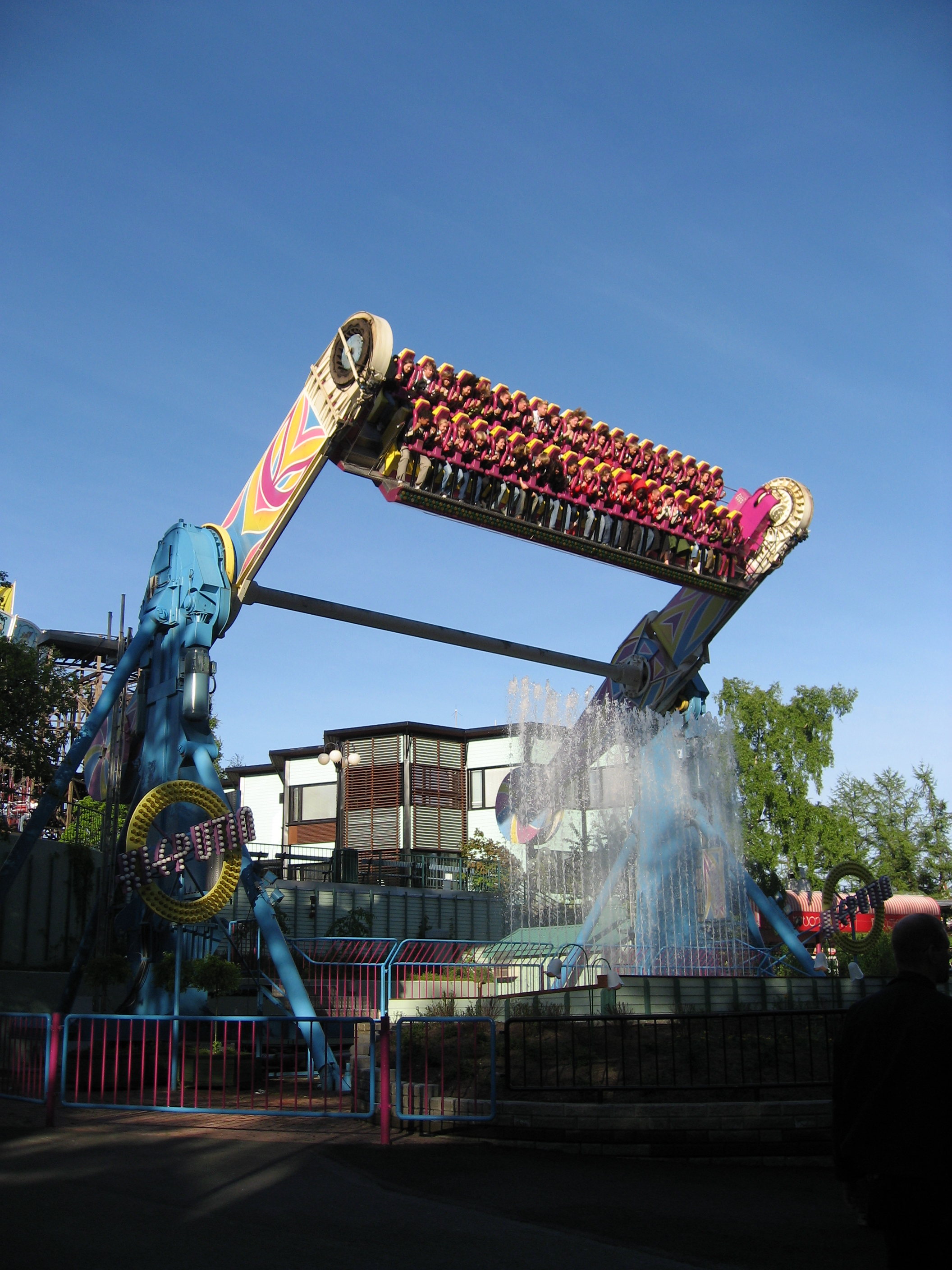 Kieputin on Linnanmäki amusement park Helsinki Finland